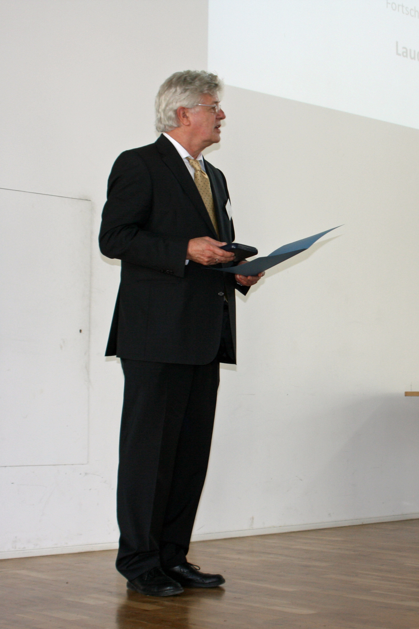 Verleihung der Karl-Escherich-Medaille an Prof. Urs Wyss (2011, Entomologentagung der DGaaE in Berlin)